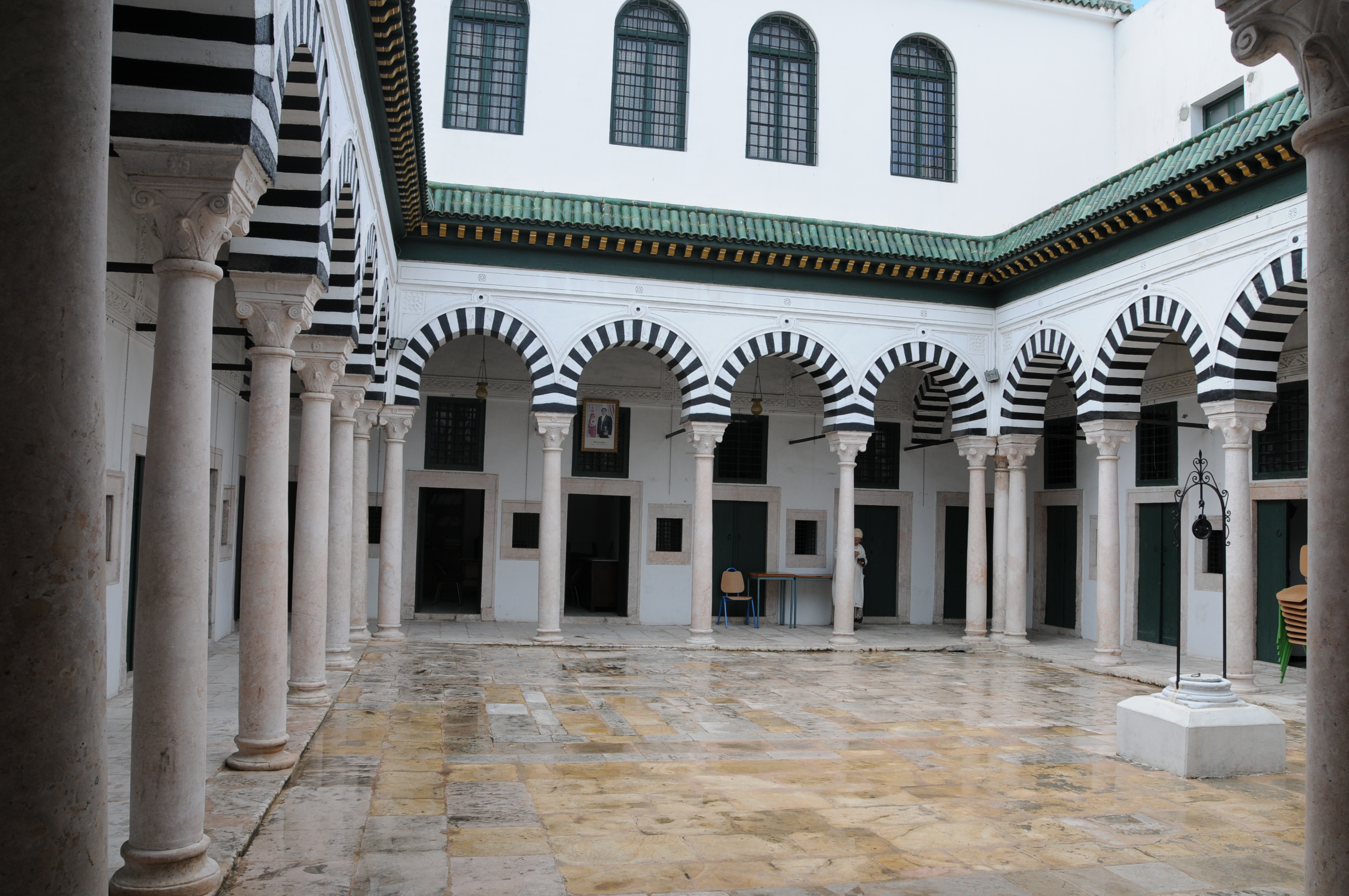 Dar Soulaimania dans la médina de Tunis. Ancien internat de l'université de la Zitouna fondée en 1754. Aujourd'hui (depuis 1985) elle est le siège de divers associations médicales ou para-médicales.